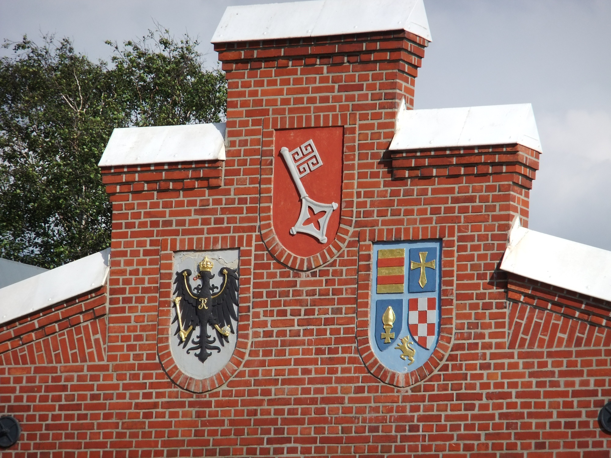 Tonnen- und Bakenamt zu Bremen, Wasser- und Schifffahrtsamt Bremerhaven in Bremerhaven, Am Alten Vorhafen 1, Detail: Die Wappen von Preußen, Bremen und Oldenburg = die drei Länder, in denen das Zuständigkeitsgebiet liegt. Das abgebildete Objekt ist ein geschütztes Kulturdenkmal in der Freien Hansestadt Bremen, mit der Nr. 1519 beim Landesamt für Denkmalpflege registriert.